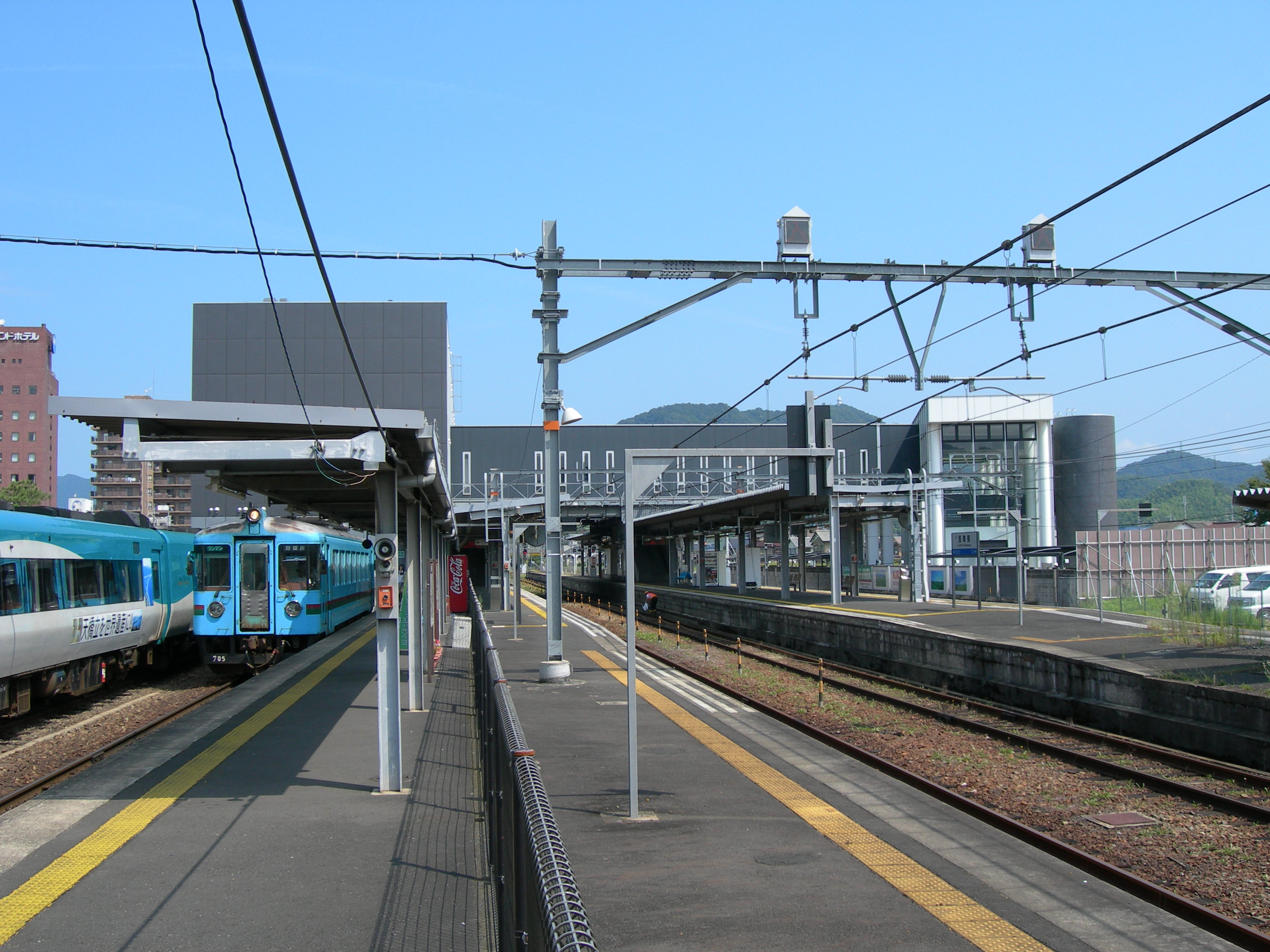 西舞鶴駅ホーム